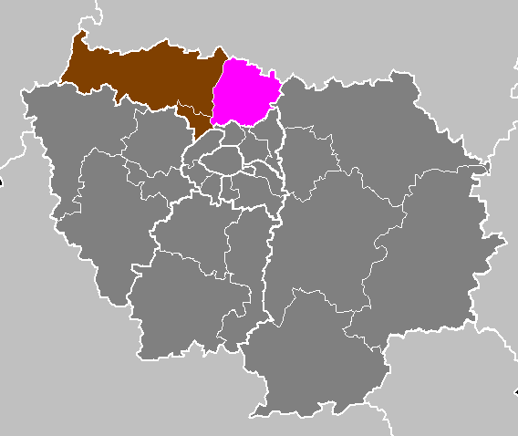 Maps of arrondissements and cantons of France: Département du Val-d Oise - Arrondissement de Sarcelles.PNG (Région Île-de-France)